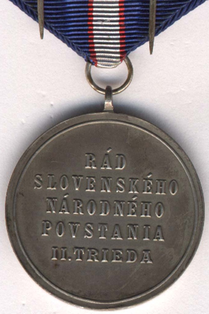 Реверс ордена Словацкого Национального восстания 2 степени (ЧССР)